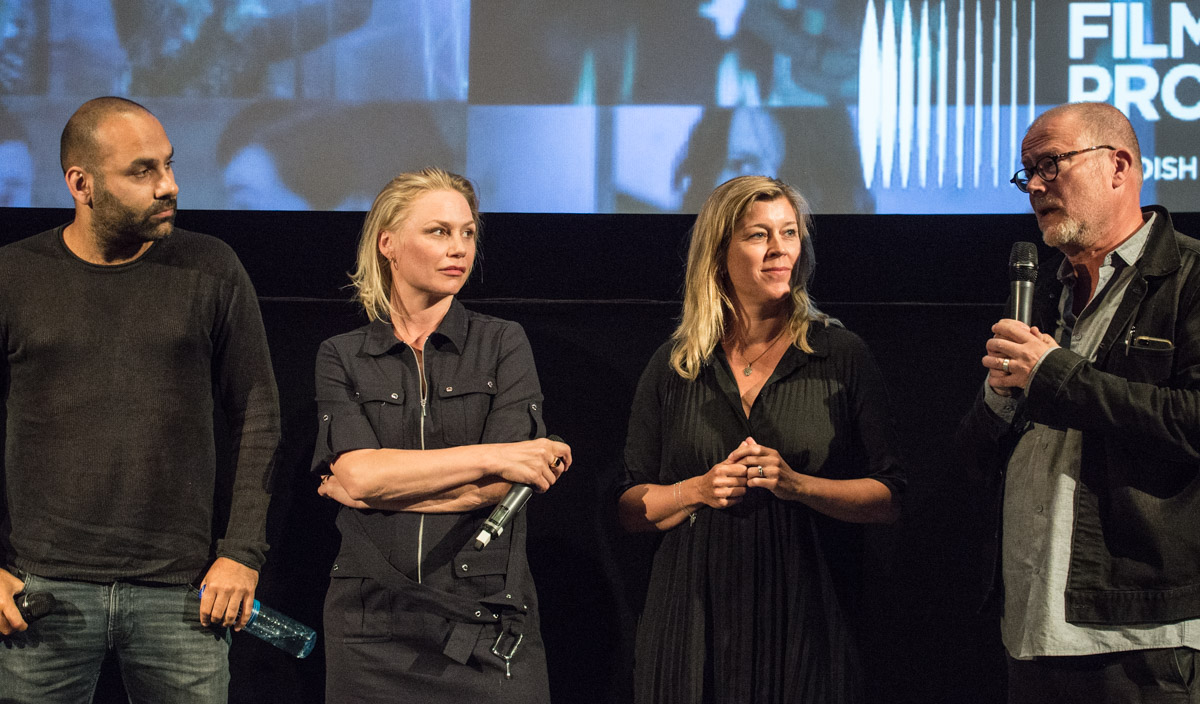 Presentationen av filmen Tjuvheder i Filmhuset i Stockholm den 17 augusti 2015. Från vänster: Peter Grönlund, Malin Levanon och producenterna Frida Bargo och Mattias Nohrborg.